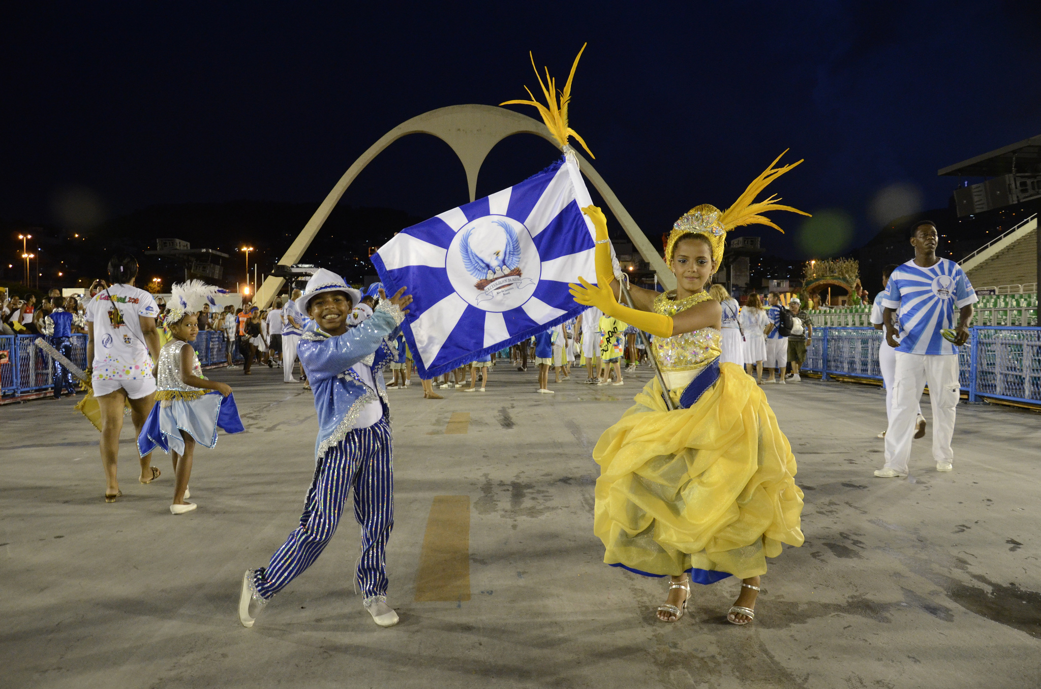 Rio de Janeiro - Pequenos sambistas fecham desfiles na Marquês de Sapucaí.